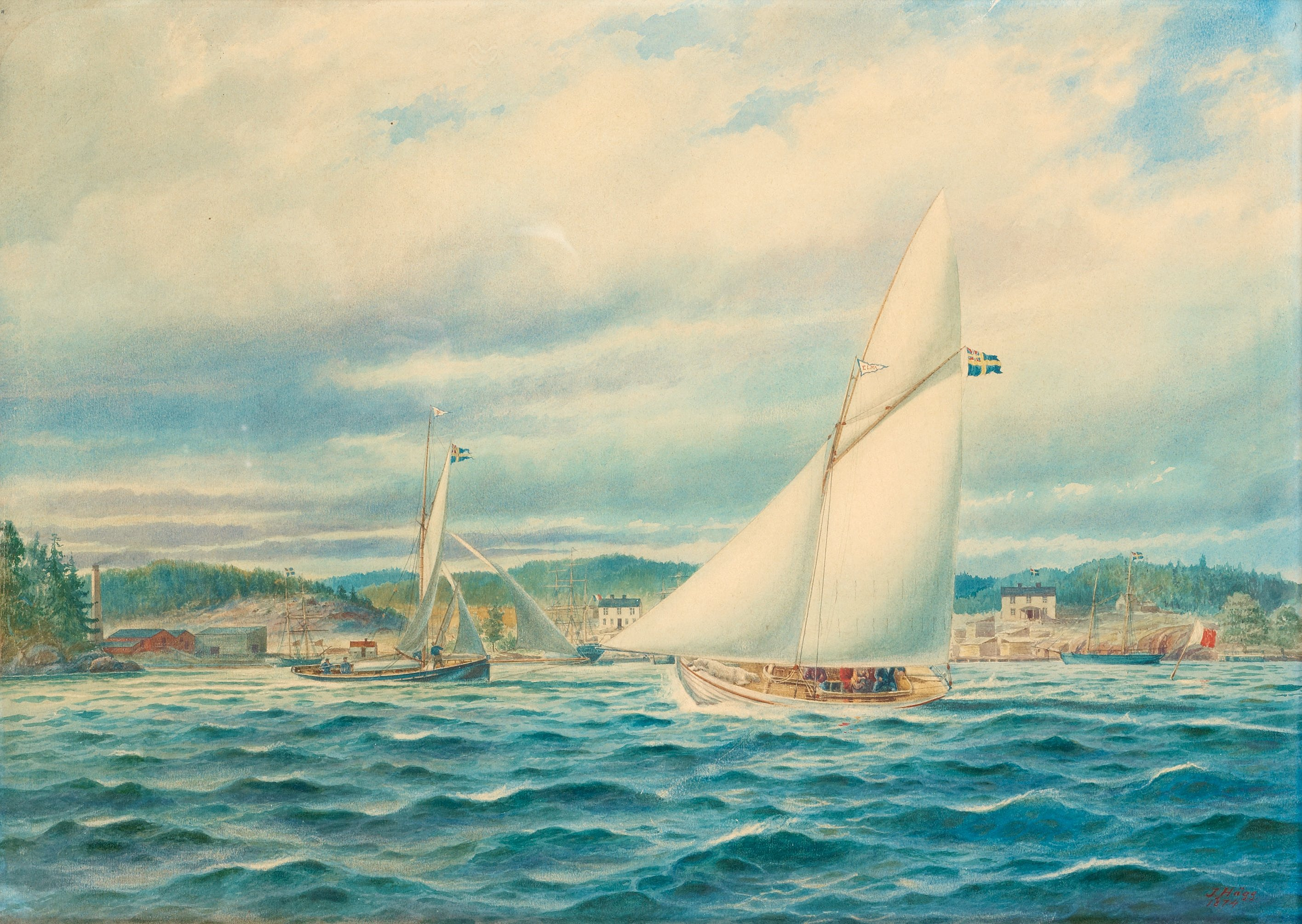 The inlet to Kyrkviken.